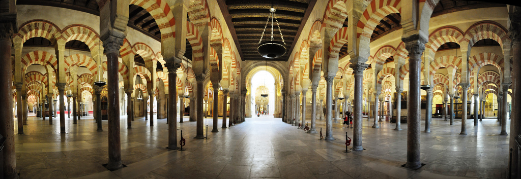 Panorámica del bosque de columnas de la Mezquita de Córdoba (España).